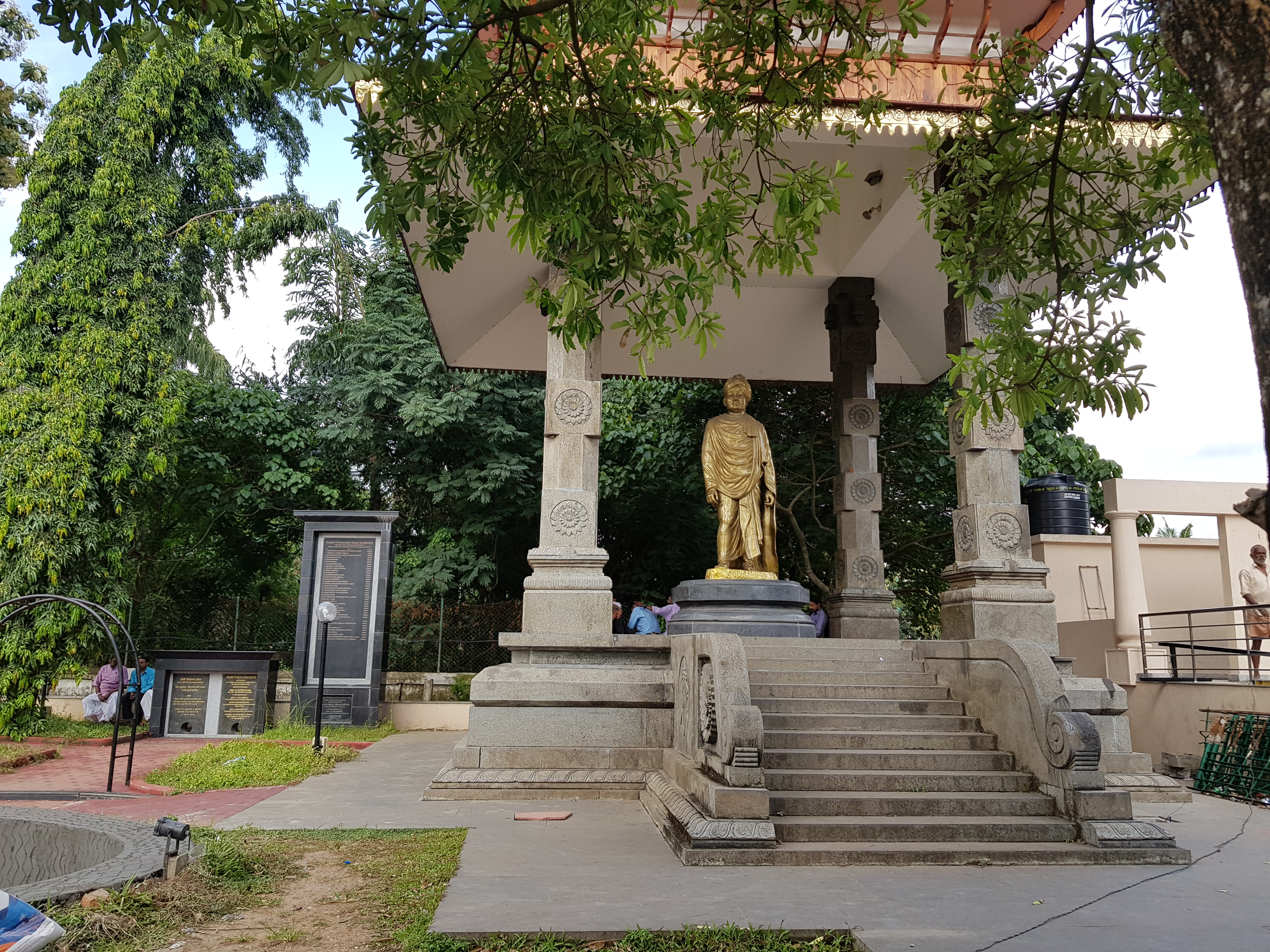 വിവേകാനന്ദ പ്രതിമ